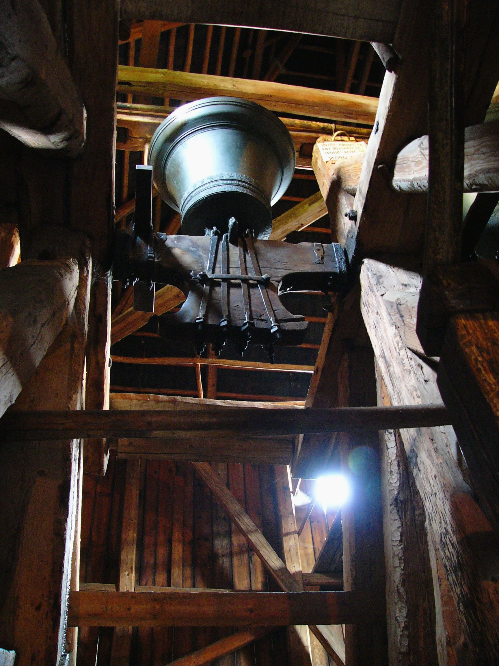 Rovensko pod Troskami, interiér dřevené zvonice kostela sv. Václava s obrácenými zvony